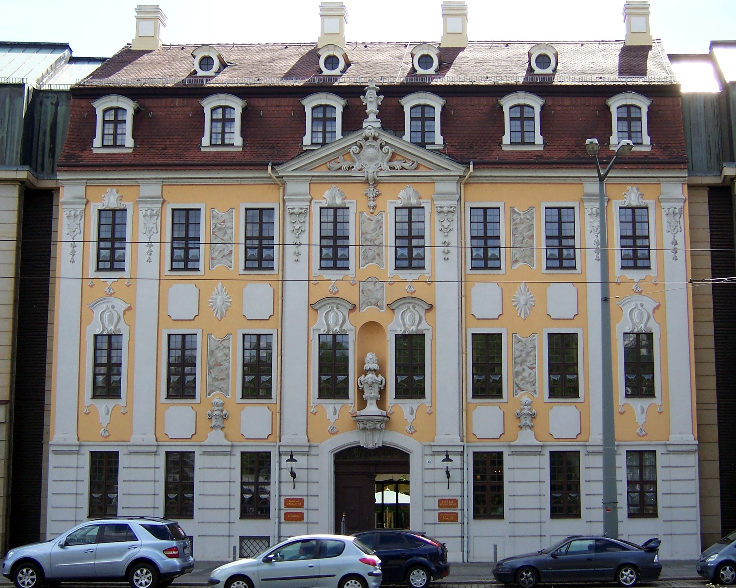 Barockgebäue Die Regierung, heute teil des Hotel Bellevue in Dresden